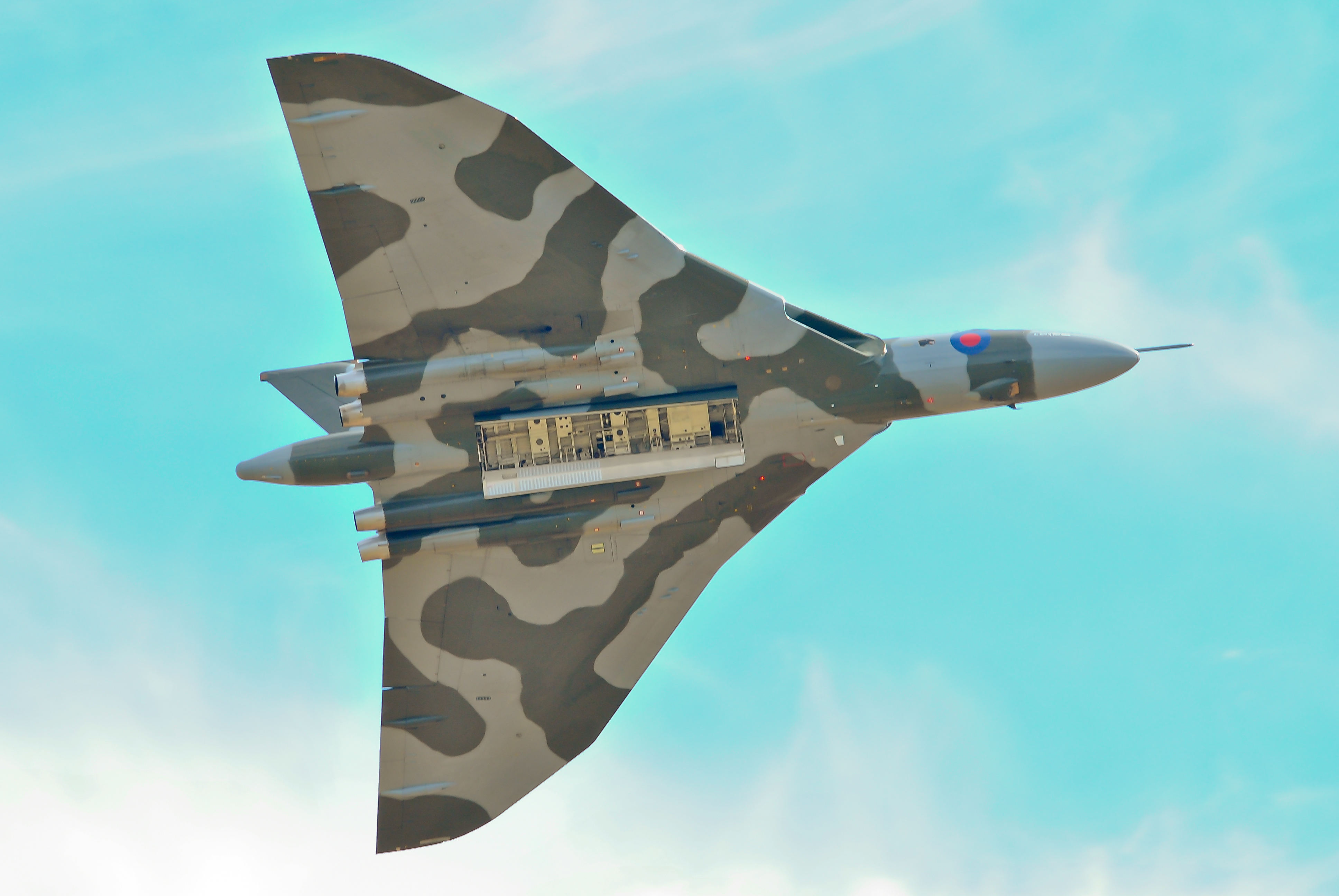 Avro Vulcan XH558